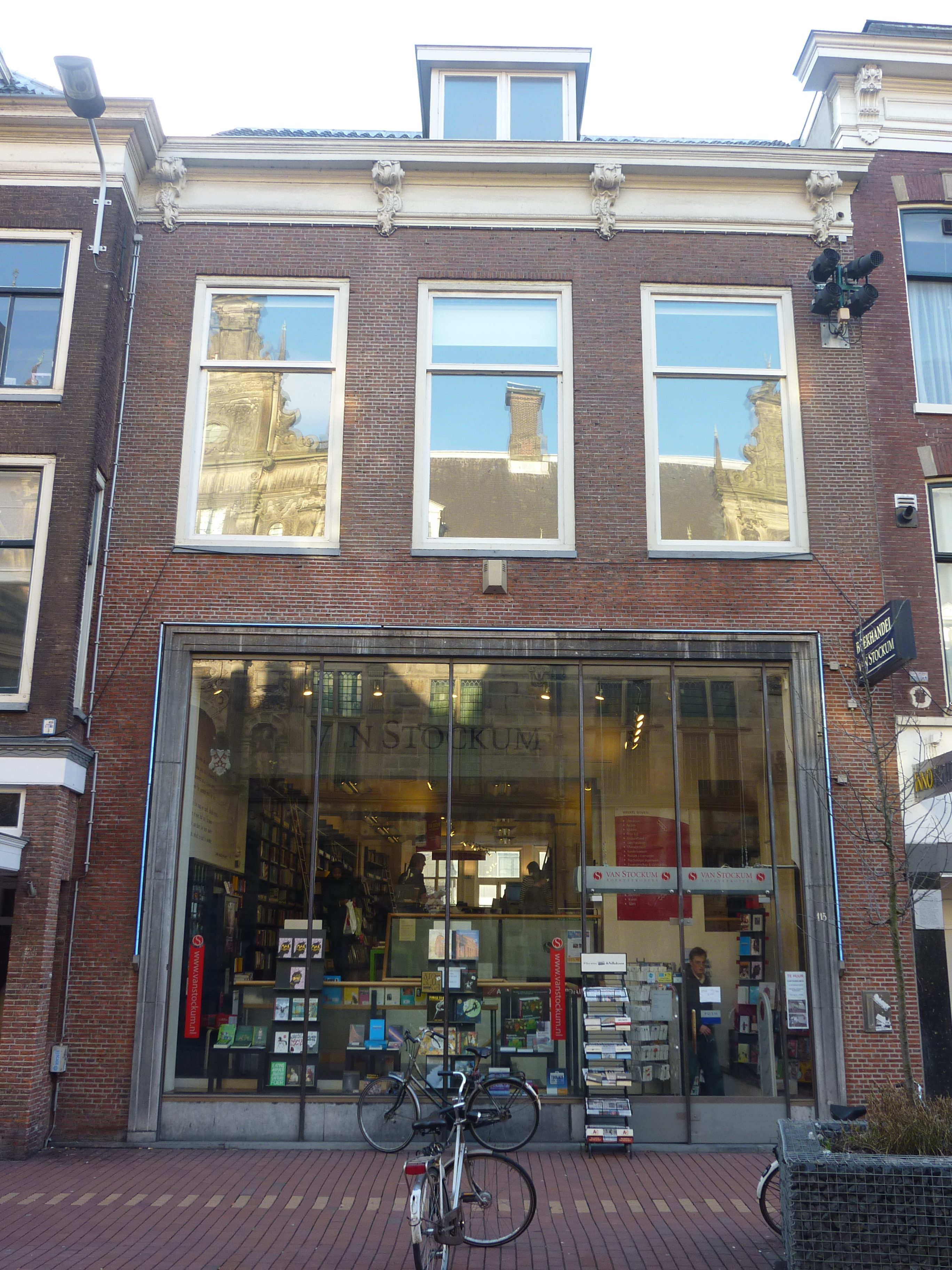 Leiden, Breestraat 113. Van Stockum Booksellers.